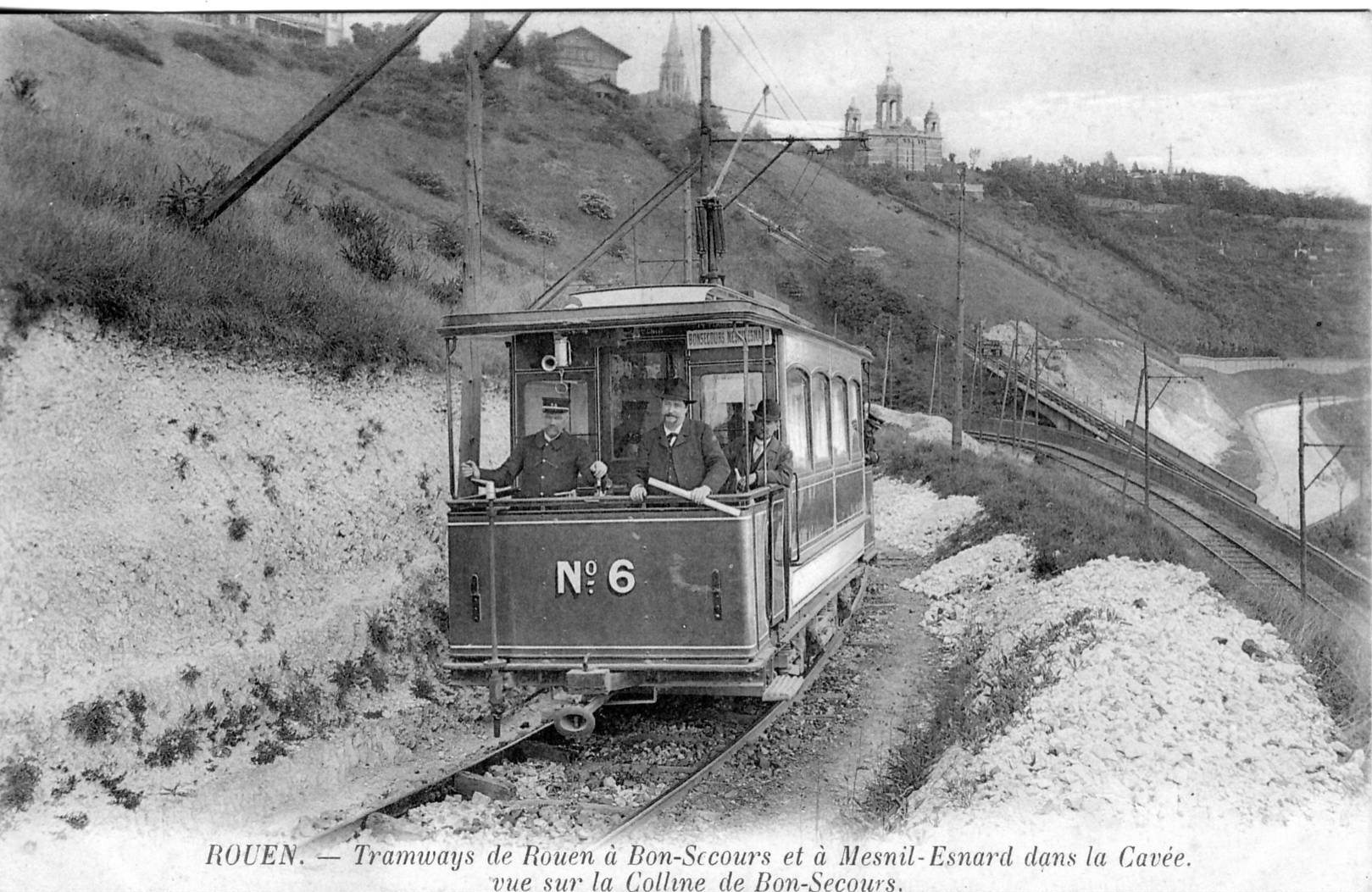 Carte postale ancienne Tramway de Rouen à Bon-Secours et à Mont-Esnard - Dans la cavée - Vue sur la colline de Bon-secours